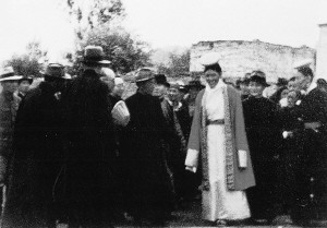 中文（中国大陆）: 1939年1月，中华民国西藏地方政府官员欢迎国民政府代表团抵藏。